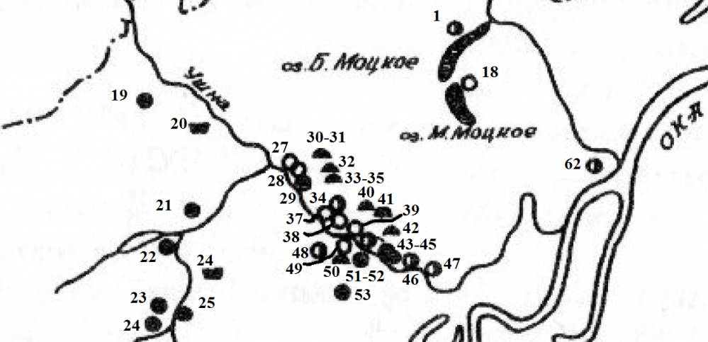 озеро Моцкое